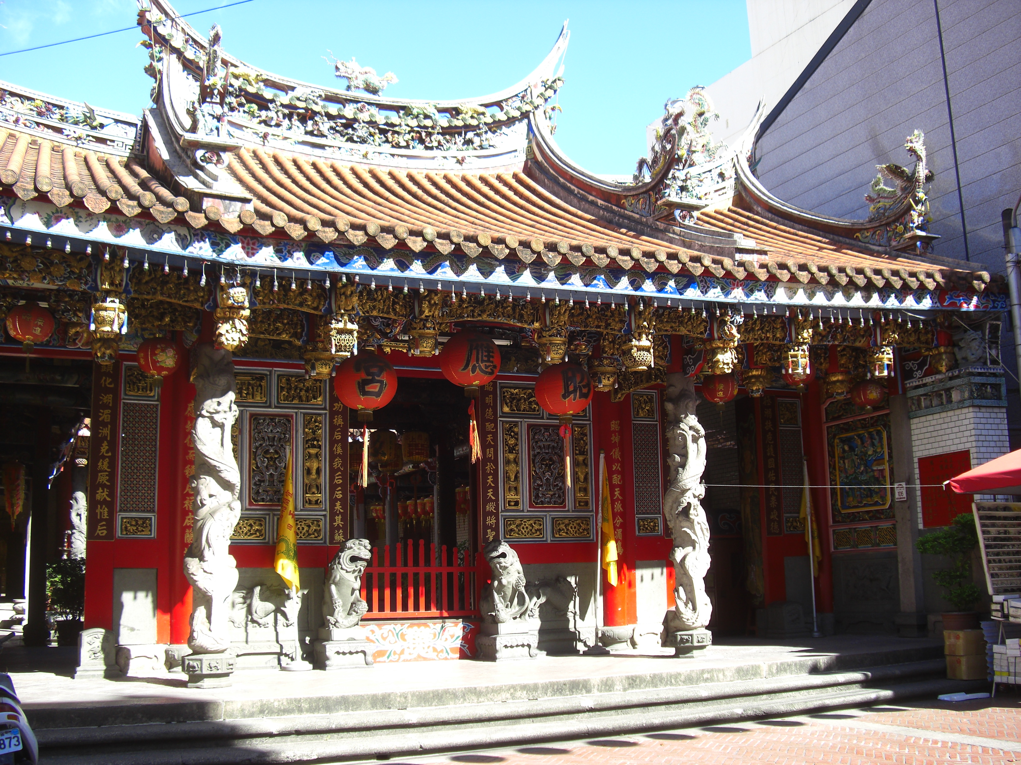 台灣宜蘭縣縣定古蹟（三級古蹟）- 昭應宮